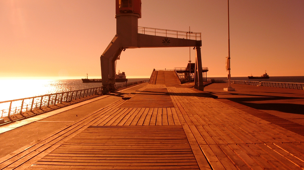 Extrañamente no había nadie